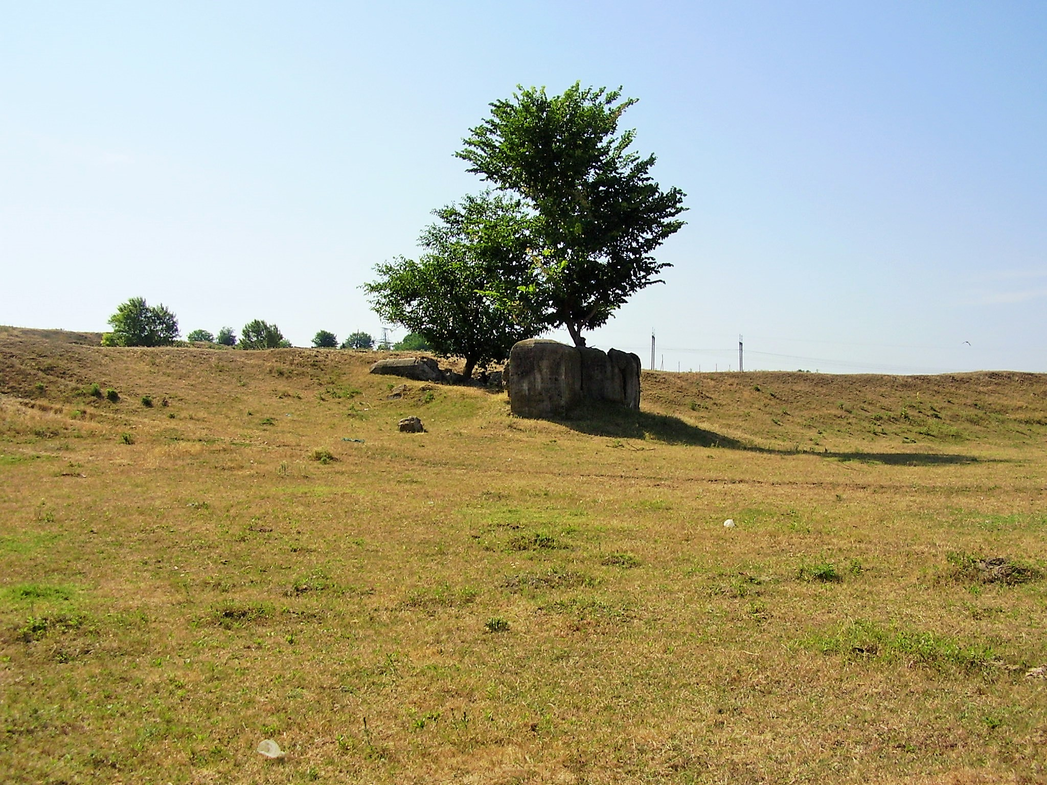 Дот южнее с. Карагаш